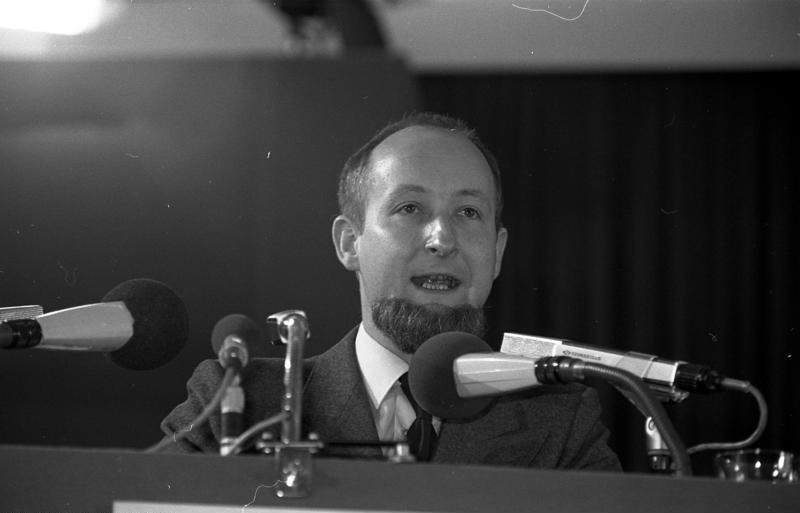 32. Ordentlicher Parteitag der FDP in der Halle 8 des Kölner Messegeländes.